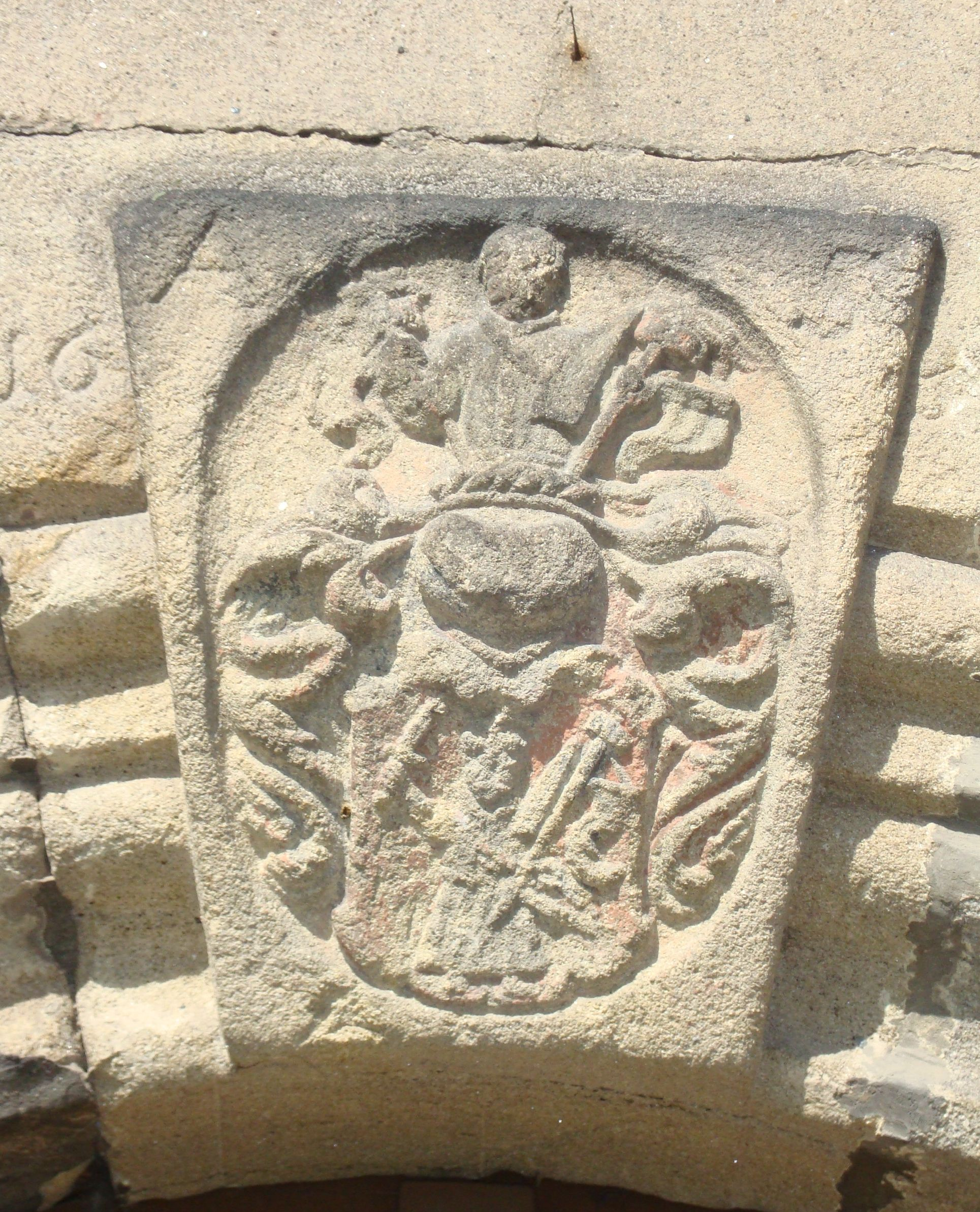 Schlussstein am Portal des Hammerherrenhauses in Wolfsgrün im Erzgebirge